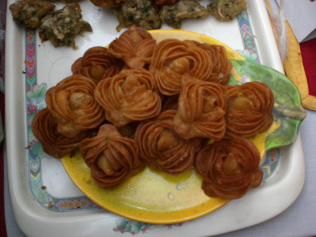 Bangladeshi Snaks.